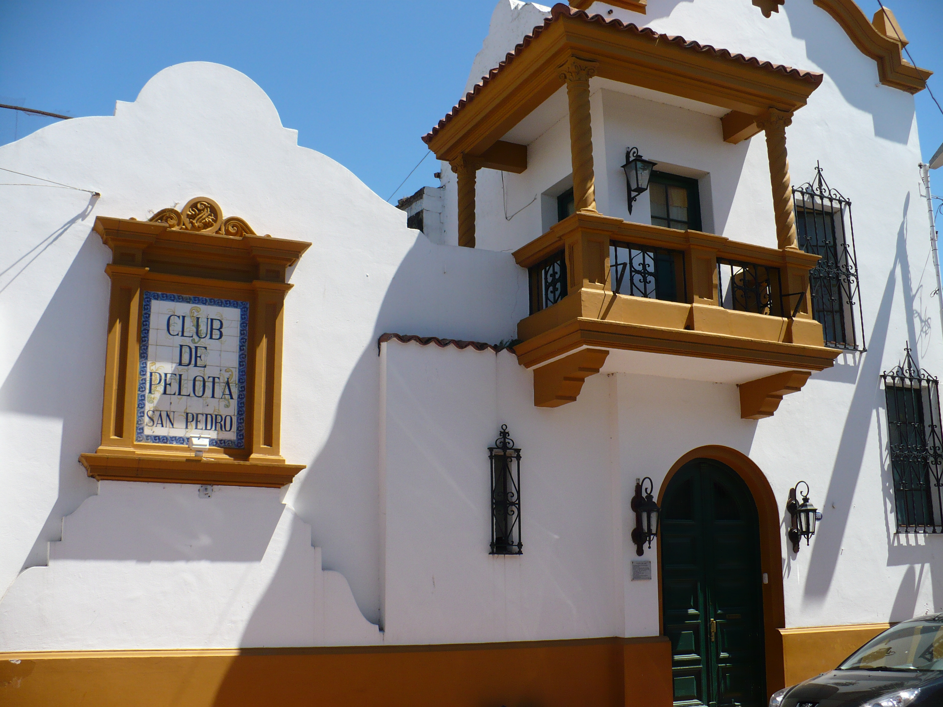 Club de pelota en San Pedro, Buenos Aires